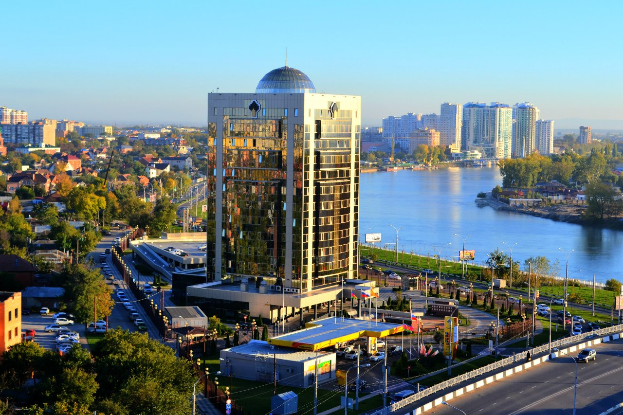 Здание "Роснефти" вид на одну из центральных улиц "Кубанонабережная"